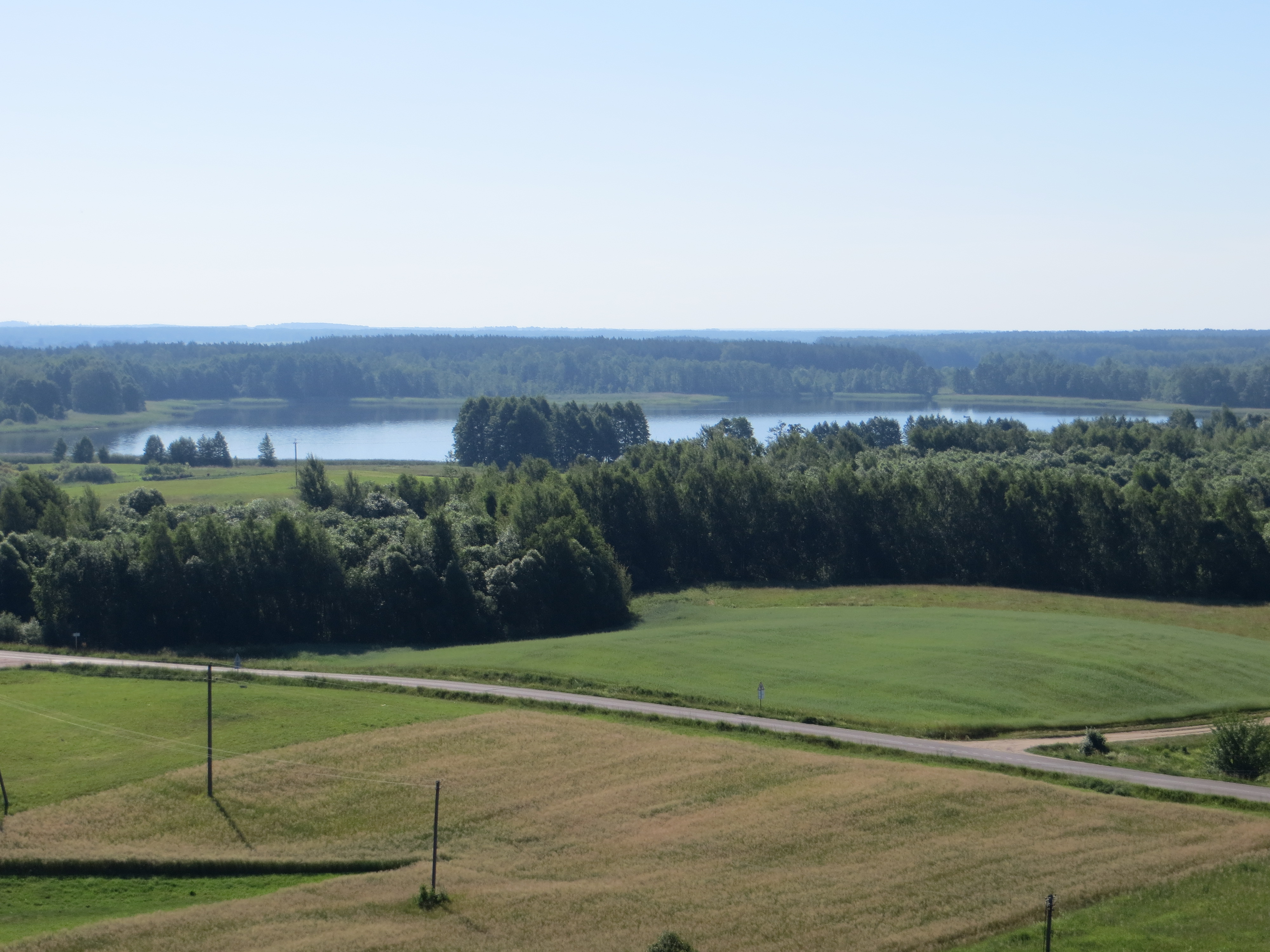 Kančėnai, Lithuania